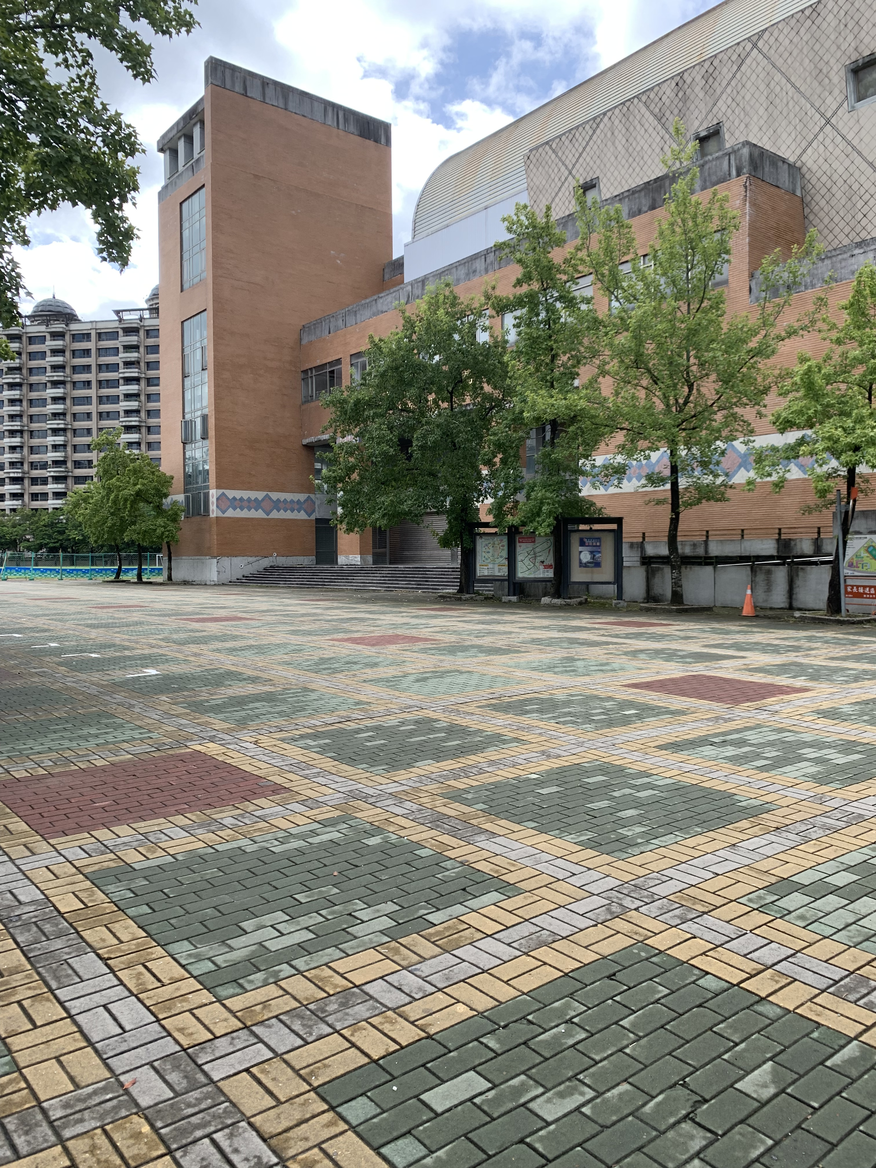 新北市立清水高中體育館正門